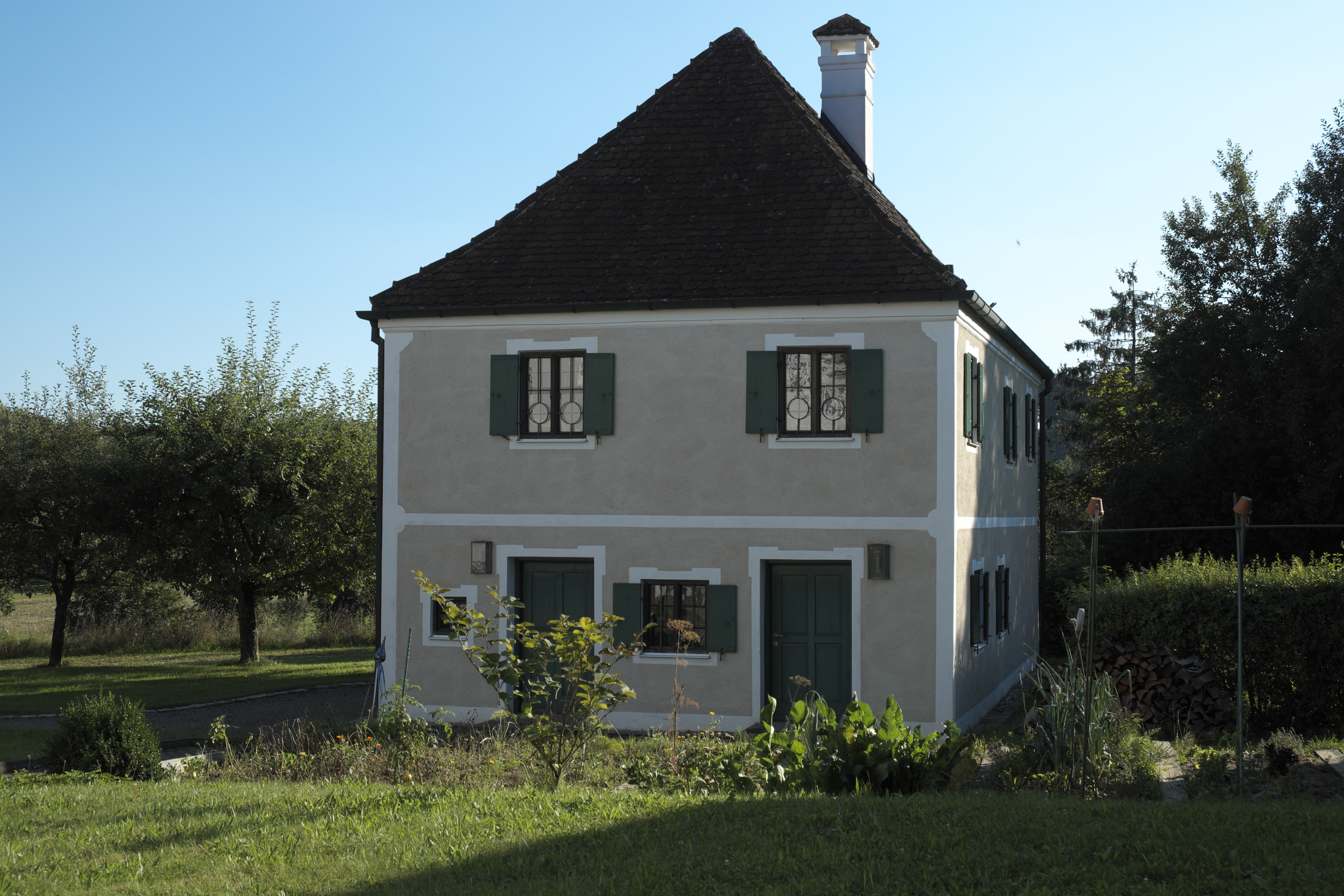 Ehemaliges Pfarrhaus in Dünzelbach (Moorenweis) im Landkreis Fürstenfeldbruck (Bayern/Deutschland), Nebengebäude